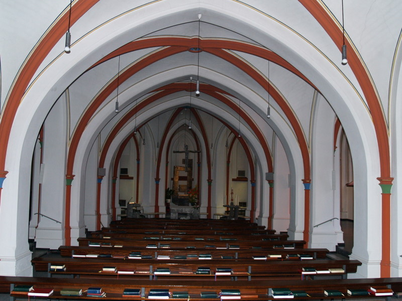 Unterkirche in Steyl (Niederlande)